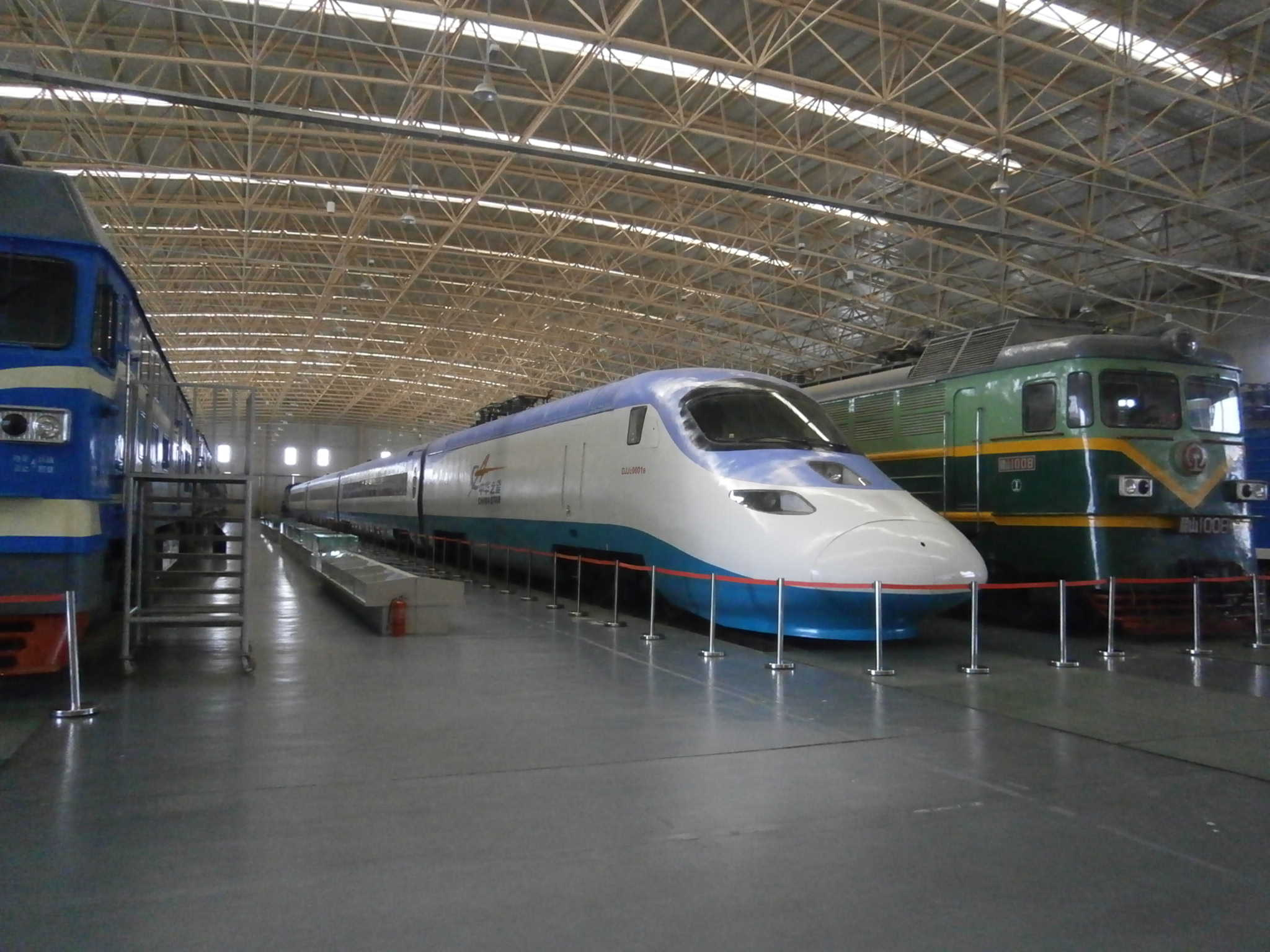 中国鉄道博物館東郊館で展示されている中国国鉄「中華之星」の車両の前景。2013年4月撮影